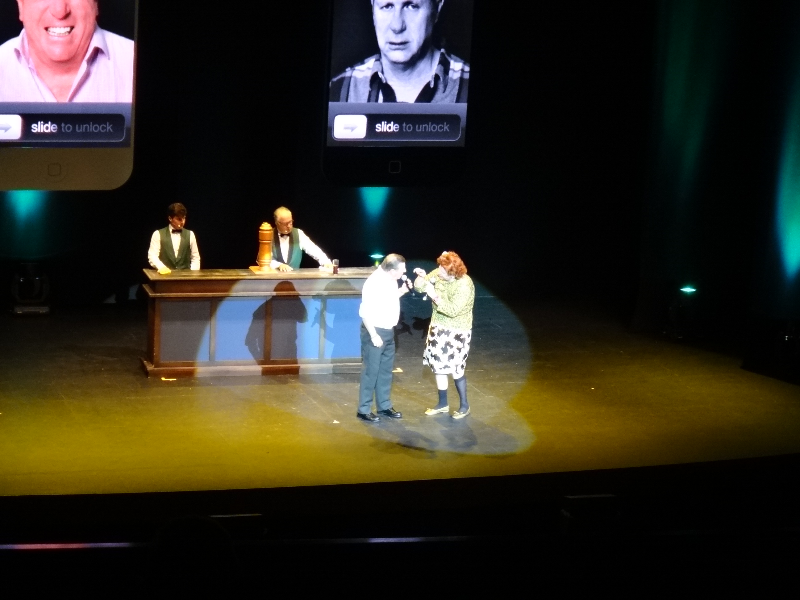 Espectáculo de los Morancos "En positivo" en el Teatro Villamarta de Jerez de la Frontera (Andalucía, España)